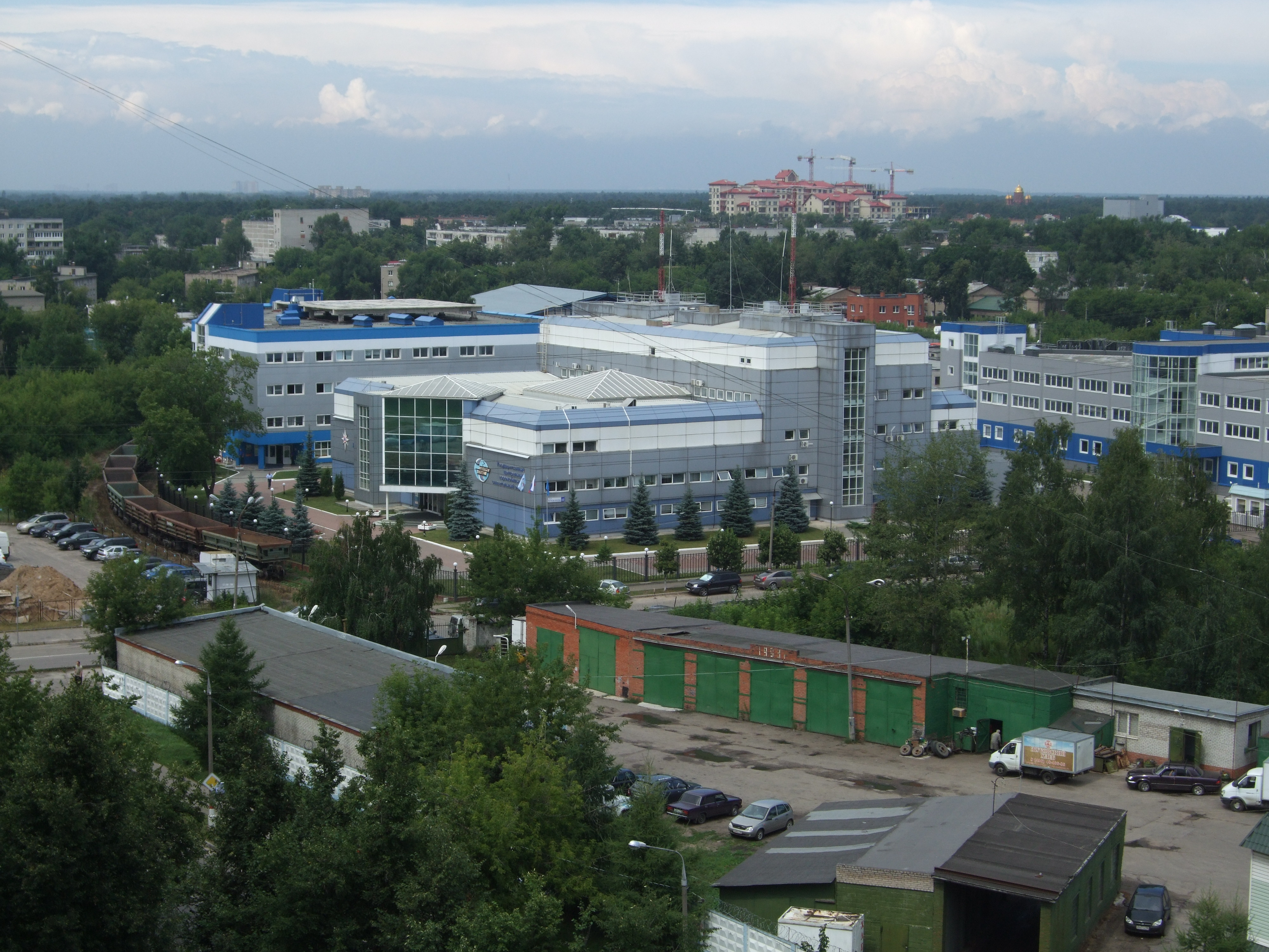 Россия, город Жуковский, на углу улиц Менделеева и Спасателей. Государственный центральный аэромобильный спасательный отряд МЧС России (Центроспас), вид из дома №13 на улице Менделеева